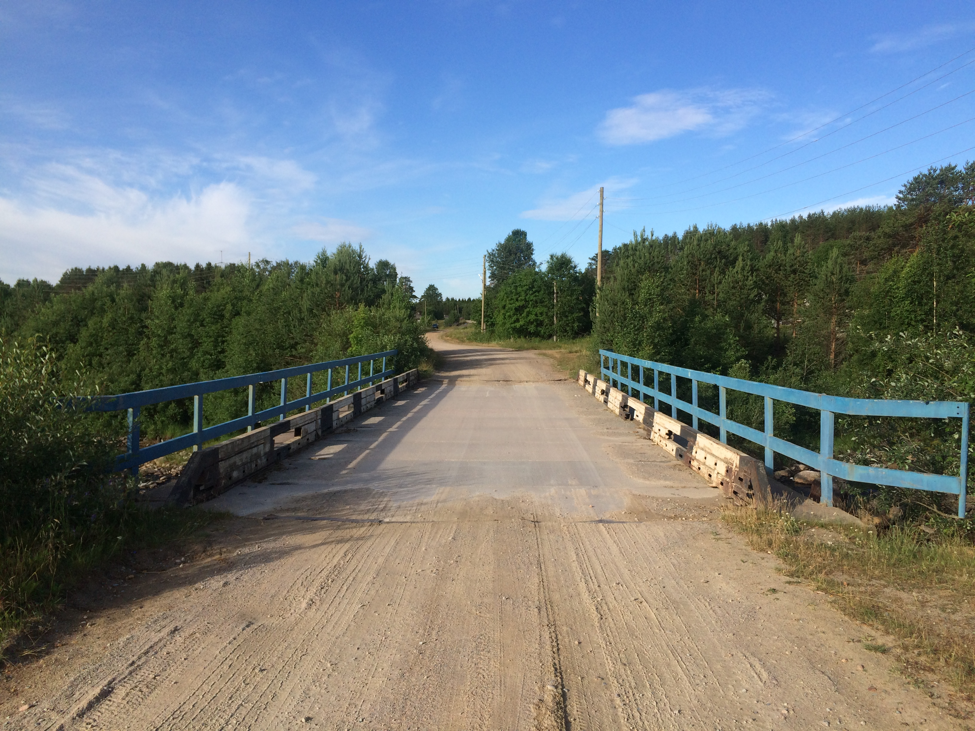 Айттойоки